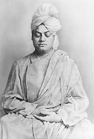 Свами ВивеканандаСвами Вивекананда в Лондоне